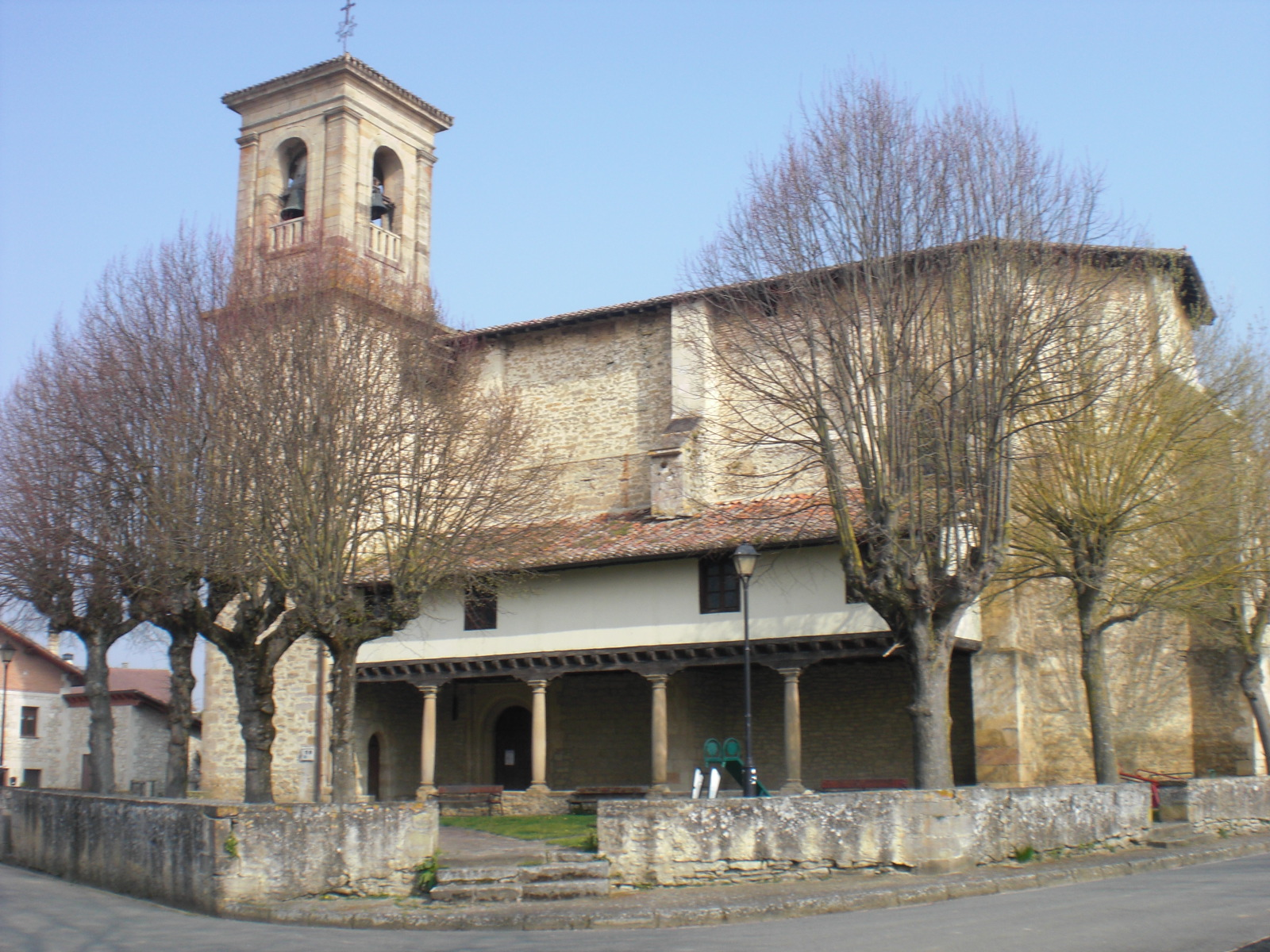 Ilarratzako eliza